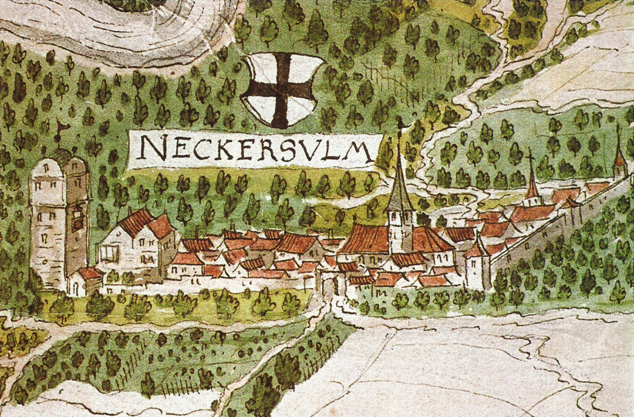 „Die älteste Darstellung Neckarsulms (Neckersulm)“, Ausschnitt